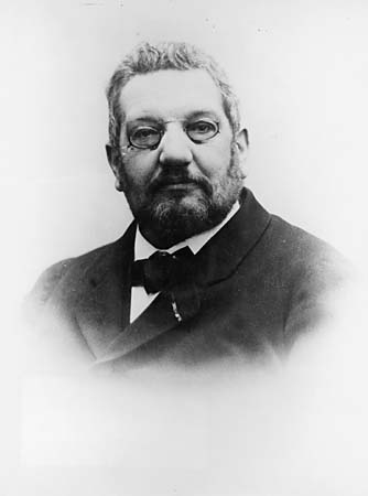 René Panhard (* 1841; † 1907), französischer Ingenieur